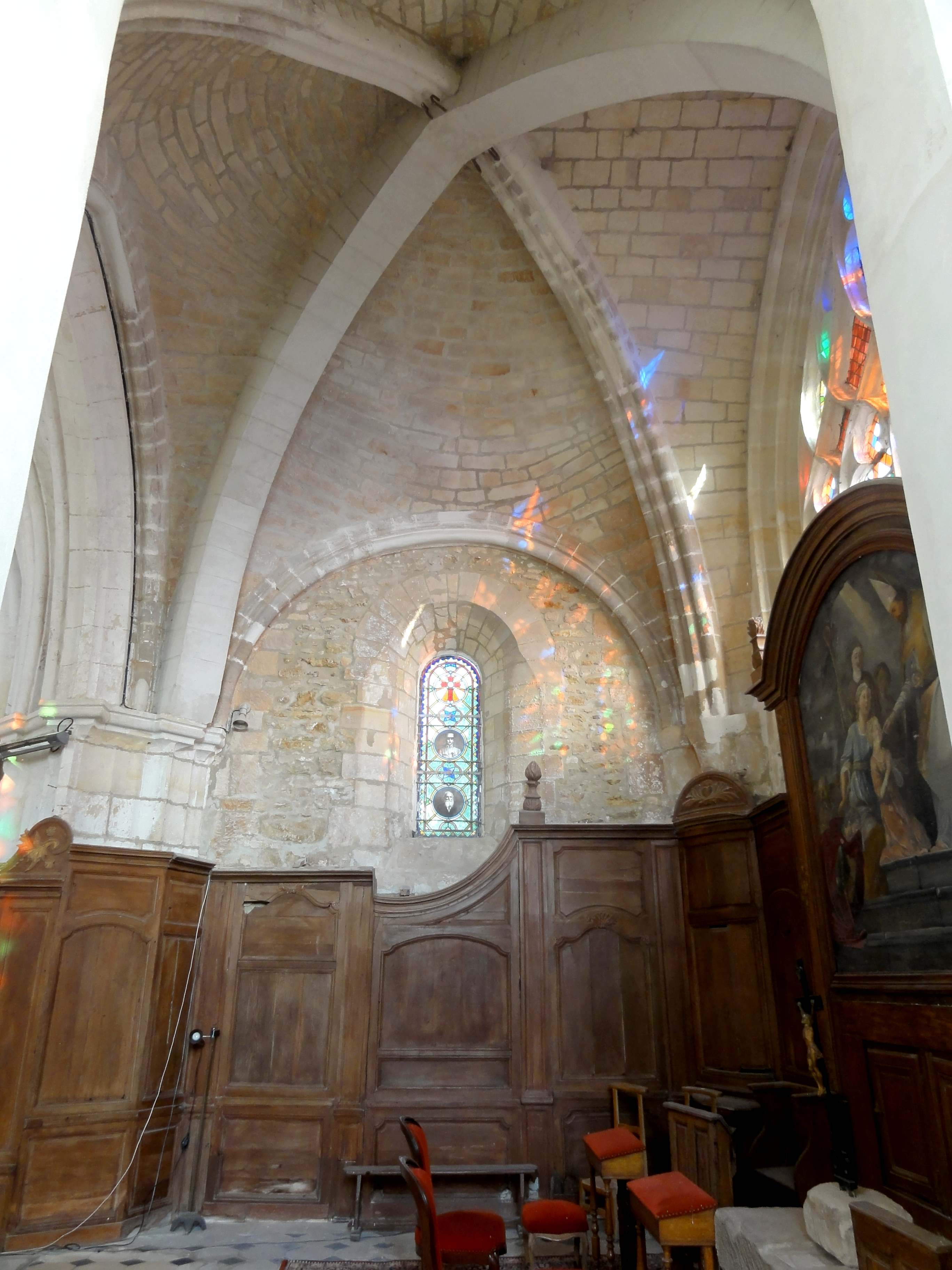 Intérieur de l'église - voir de l'église.